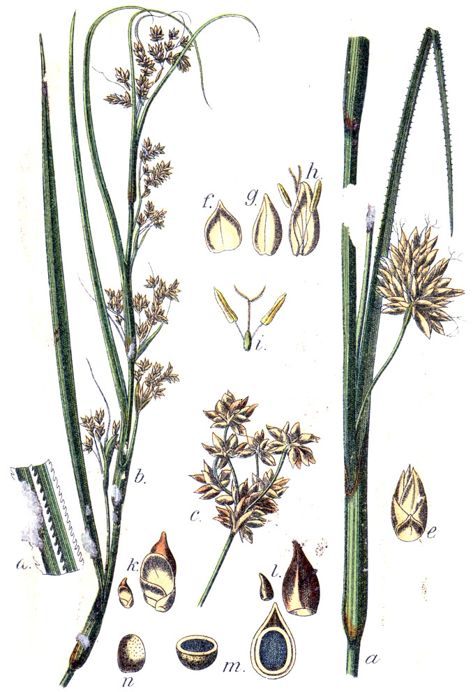 Cladium mariscus (L.) Pohl Original Caption Schneide, Cladium mariscus